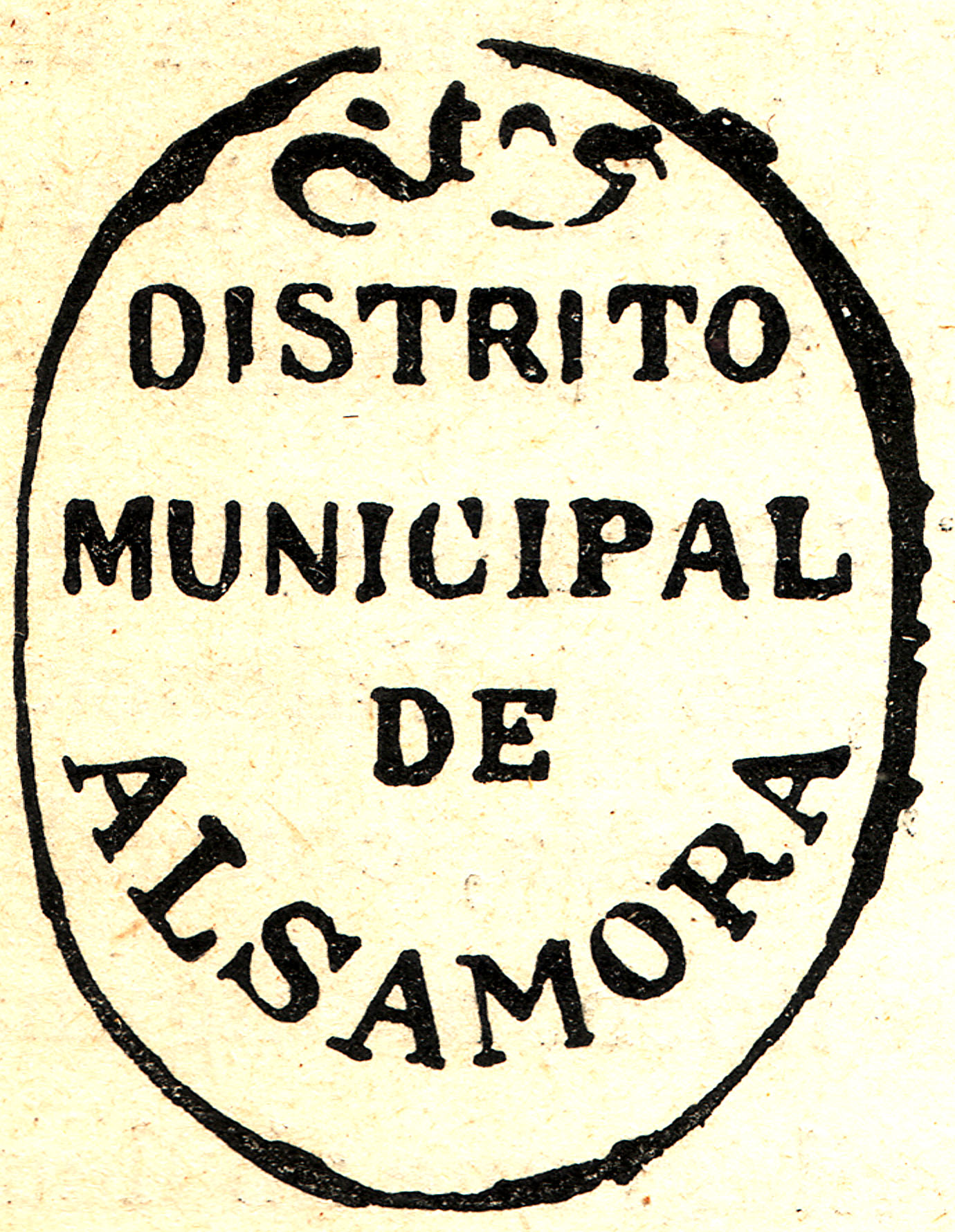 Segell municipal d'Alsamora (Sant Esteve de la Sarga, Pallars Jussà)